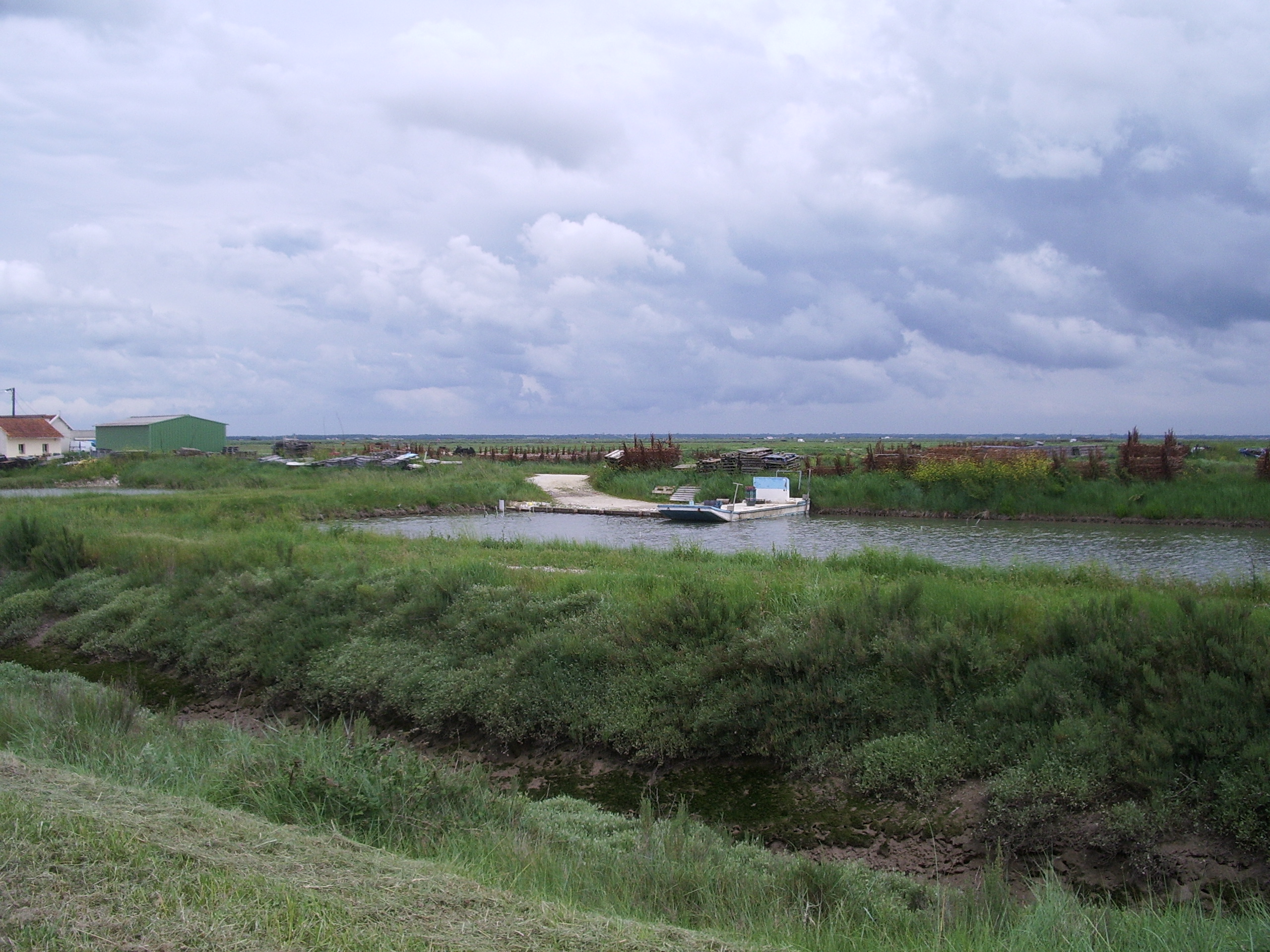 Plate ostréicole (barge en aluminium à fond plat) sur le port d'Orivol à Etaules, Charente-Maritime, France